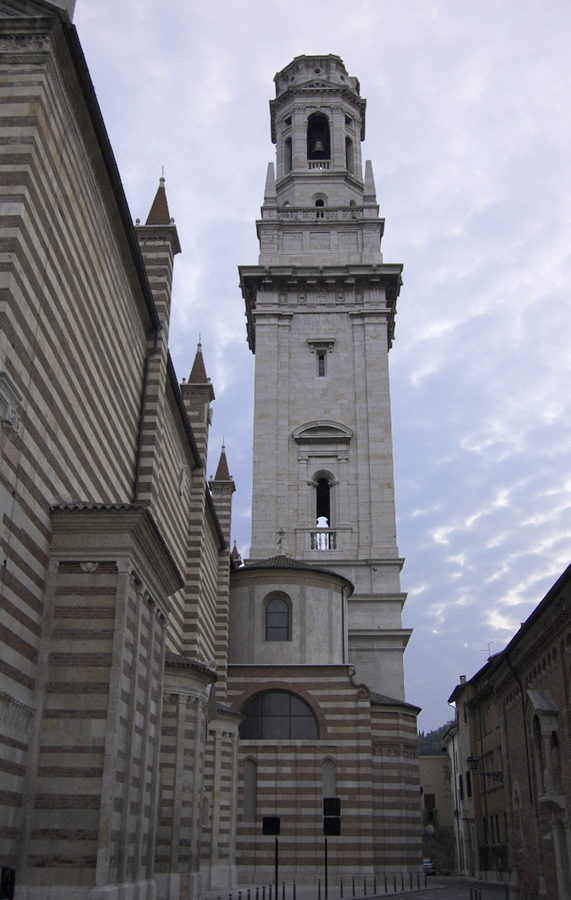 Il campanile incompiuto del Duomo di Verona